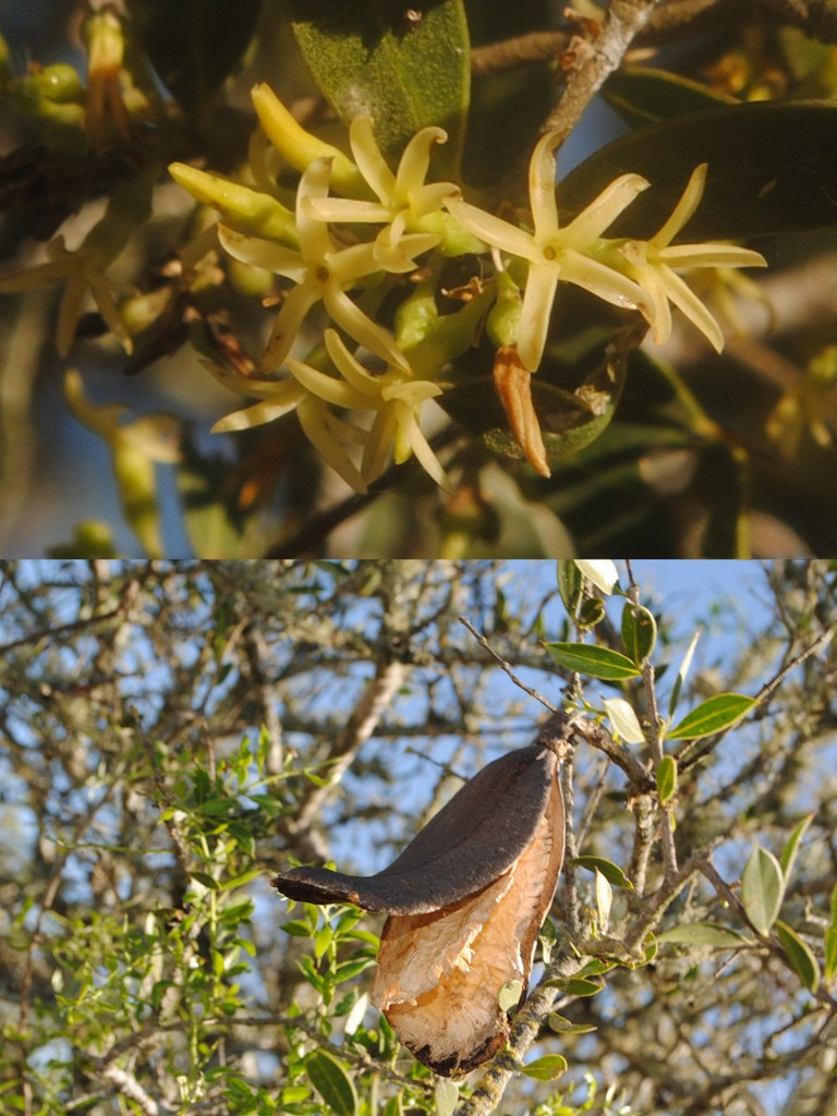 Aspidosperma quebracho-blanco. Apocynaceae. Fotos tomadas en bosque parque sobre blanqueal al margen del Arroyo Vera, departamento de Soriano, Uruguay.